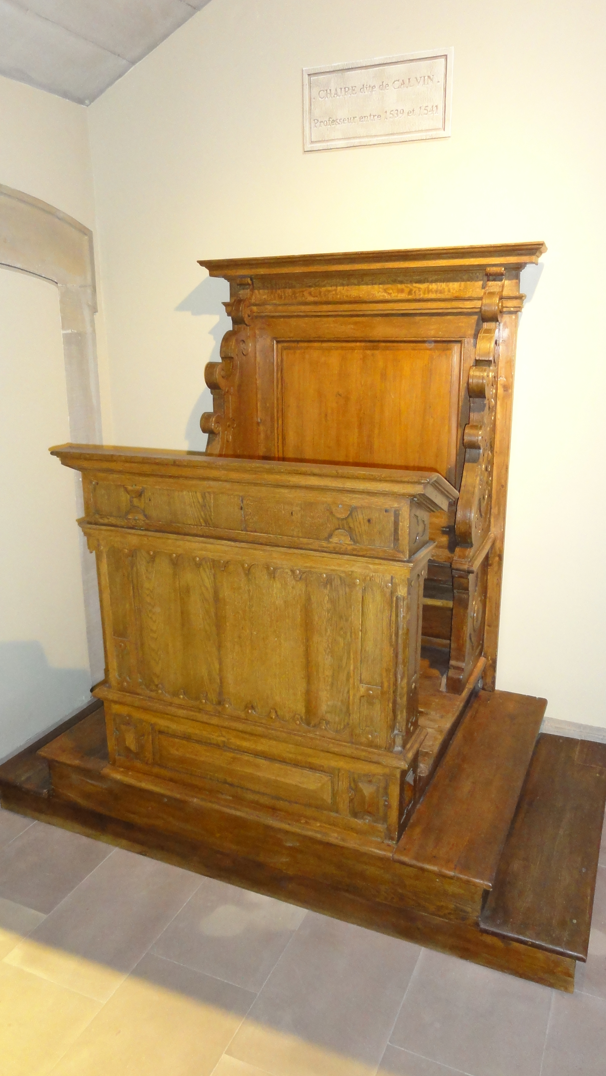 Alsace, Bas-Rhin, Strasbourg, Gymnase Jean Sturm (XIXe), 8 place des étudiants: Ancienne chaire de Jean Calvin. Informations supplémentaires: [1]